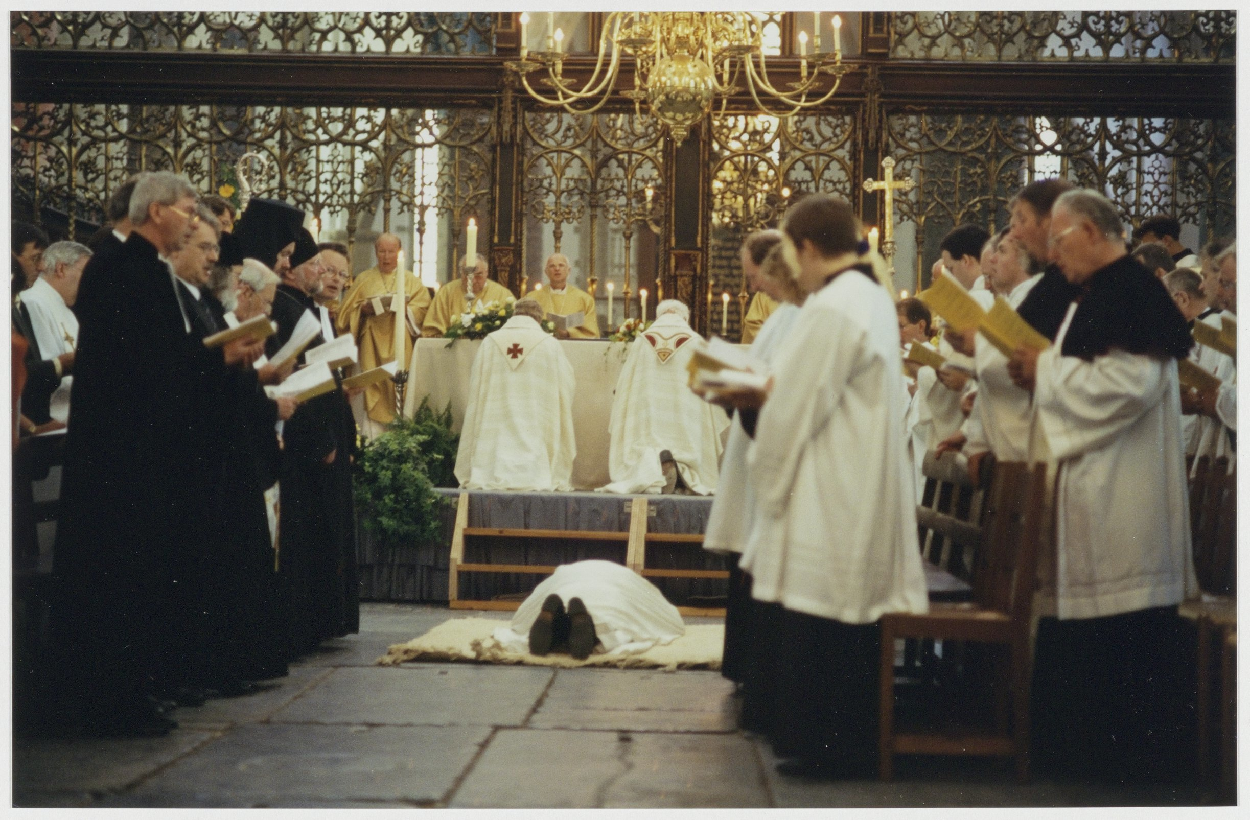 CollectieCollectie Fotoburo de BoerInventarisnummerNL-HlmNHA_54036167NL-HlmNHA_1478_41306KBeschrijvingDe inwijding van de Vlaming Jan Lambert Wirix tot zeventiende oud-katholieke bisschop van Haarlem. De inwijding vond plaats in de hervormde Grote Kerk.FotonummerNL-HlmNHA_1478_2719DocumenttypeHistorieprenten, tekeningen en foto'sVervaardigerHendriks, Rob (UP De Boer) Soort vervaardigerFotograaf Interieur/ExterieurinterieurAnnotatiesHD150595LandNederland ProvincieNoord-Holland GemeenteHaarlem PlaatsHaarlem StraatGrote Markt GeografischCentrum Begindatum05-1995Einddatum05-1995TechniekFoto TrefwoordenKerken, religie